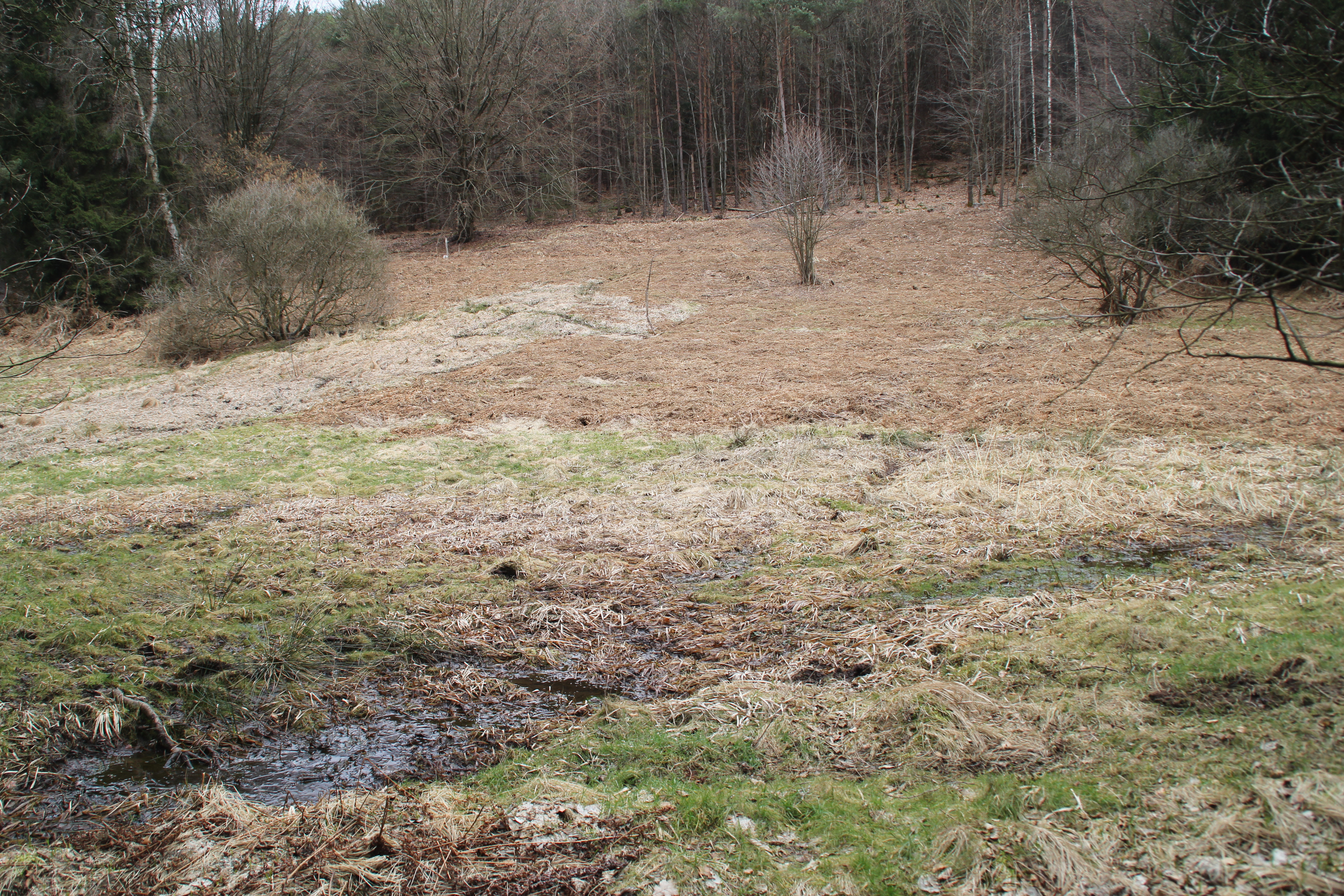 Lichtung im Naturschutzgebiet Amphibienfreistätte Sommergrund bei Kleinkahl, Bayern